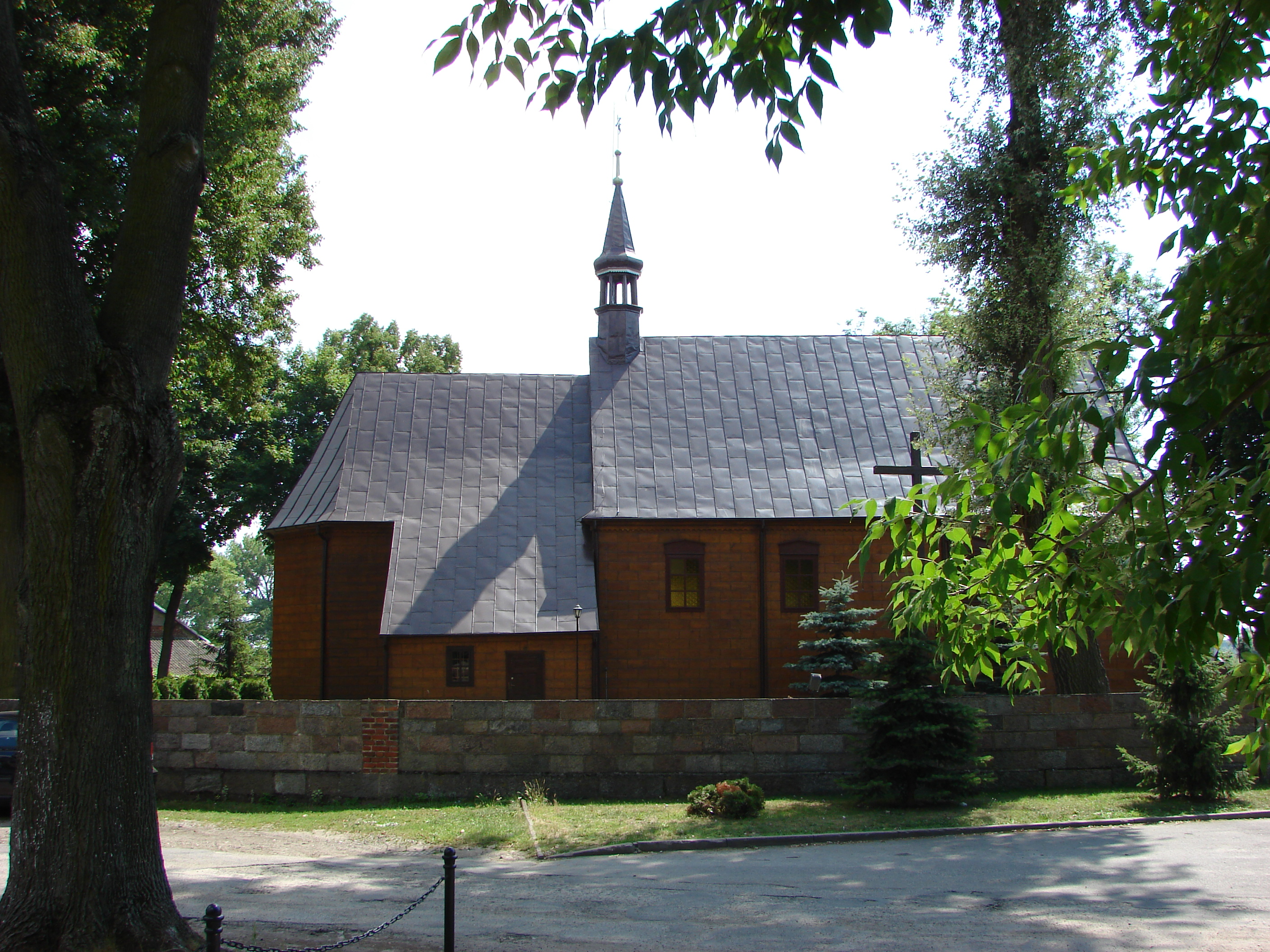 Pęczniew, kościół